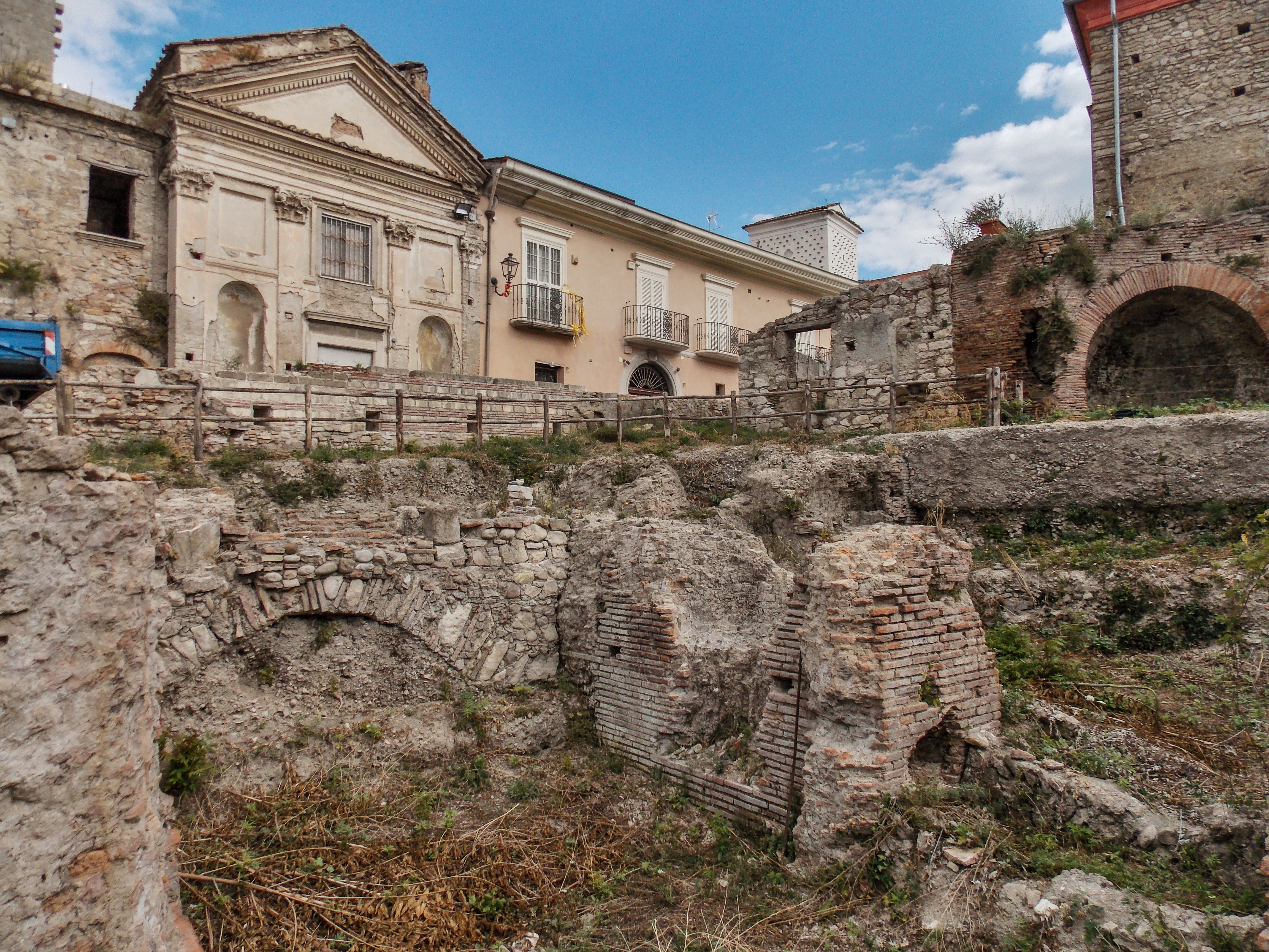 I resti delle terme romane di San Cristiano (II sec. d.C.) nel rione Triggio a Benevento: gli scavi di Casa Campi e la chiesa di San Cristiano sullo sfondo